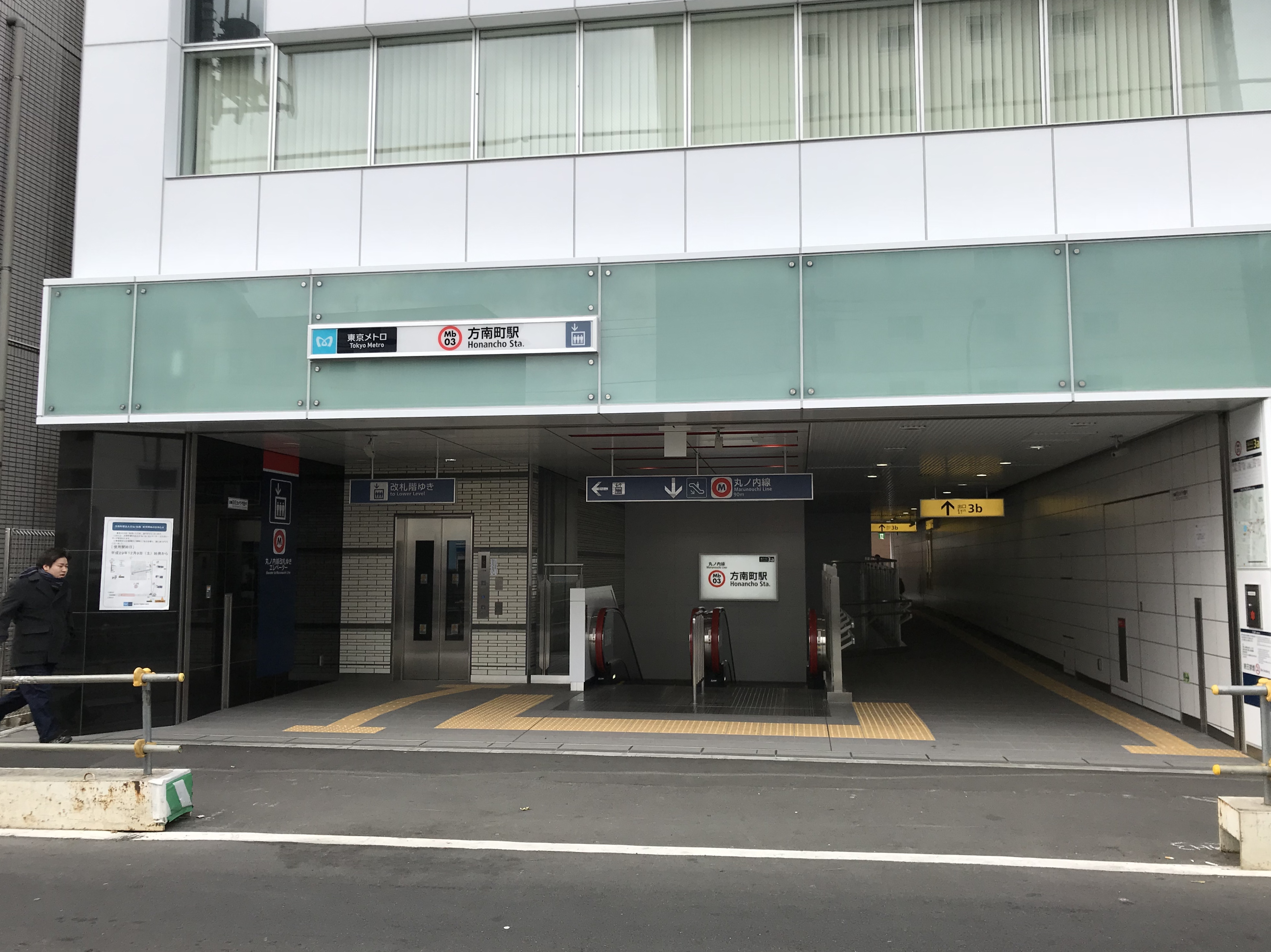 東京メトロ丸ノ内線方南町駅3a・3b出入口